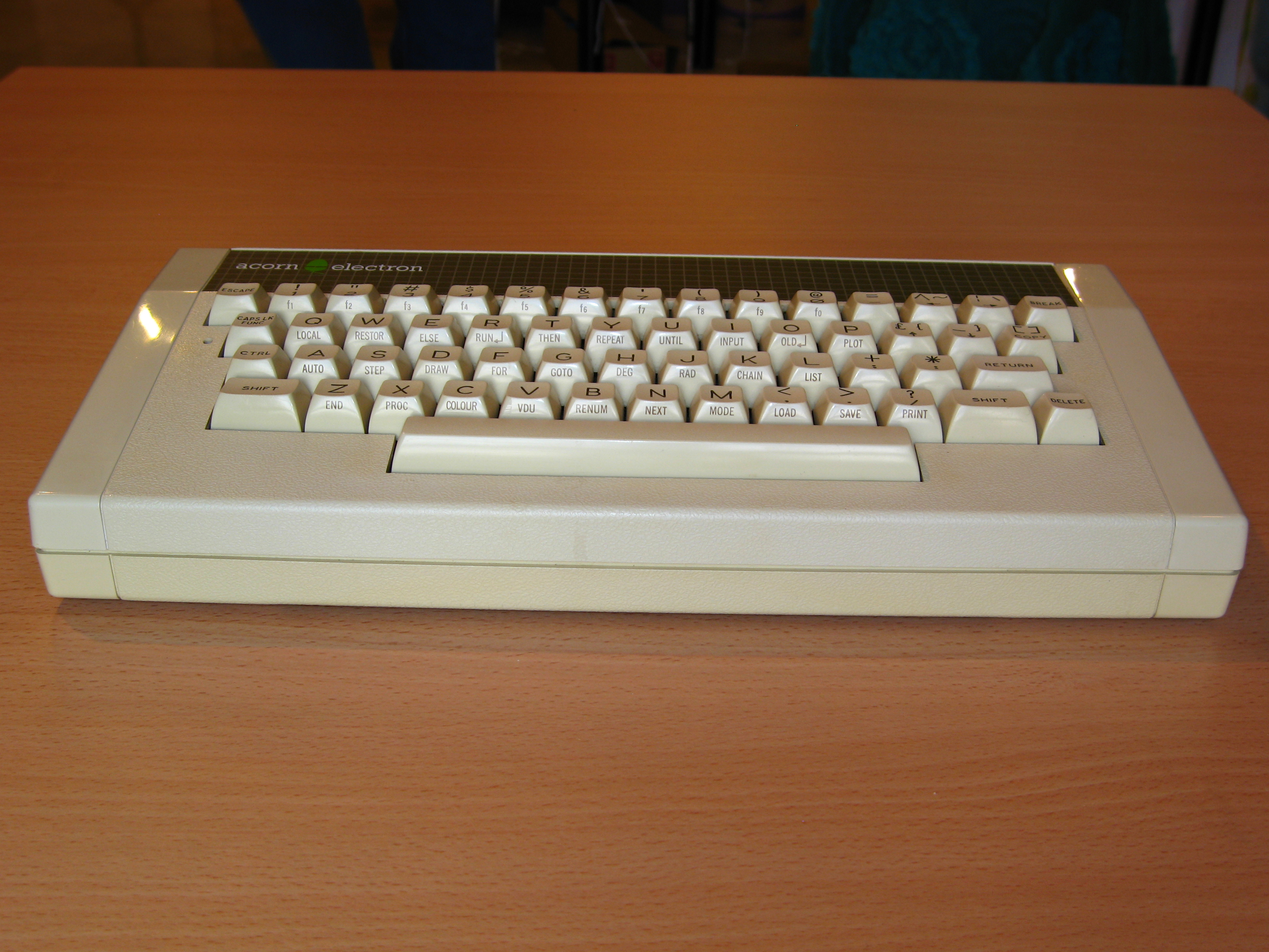 Ordenador doméstico Acorn Electron, en la MadriSX & Retro 2007